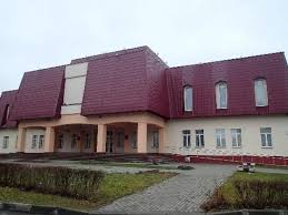 будынак музея